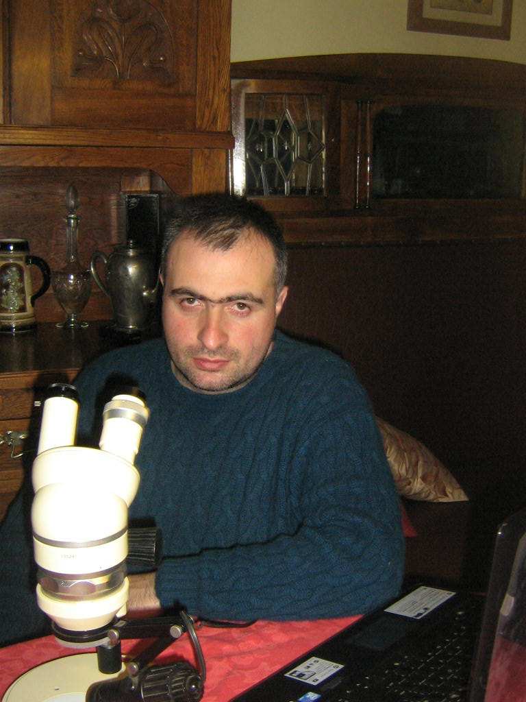 კახაბერ ქოიავა.